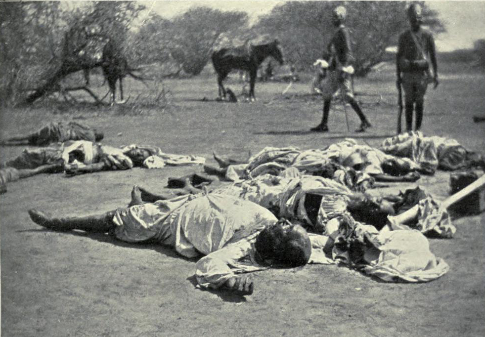 صورة إستشهاد الخليفة عبد الله و أحمد فضيل بعد (معركة أم دبيكرات) نوفمبر 1899 م